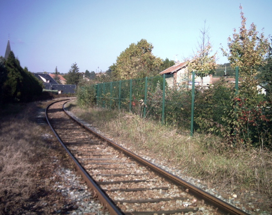 La voie de la ligne Lyon-Trévoux à la hauteur de Fleurieu. L'ancienne gare, devenue maison particulière, est visible sur la droite.